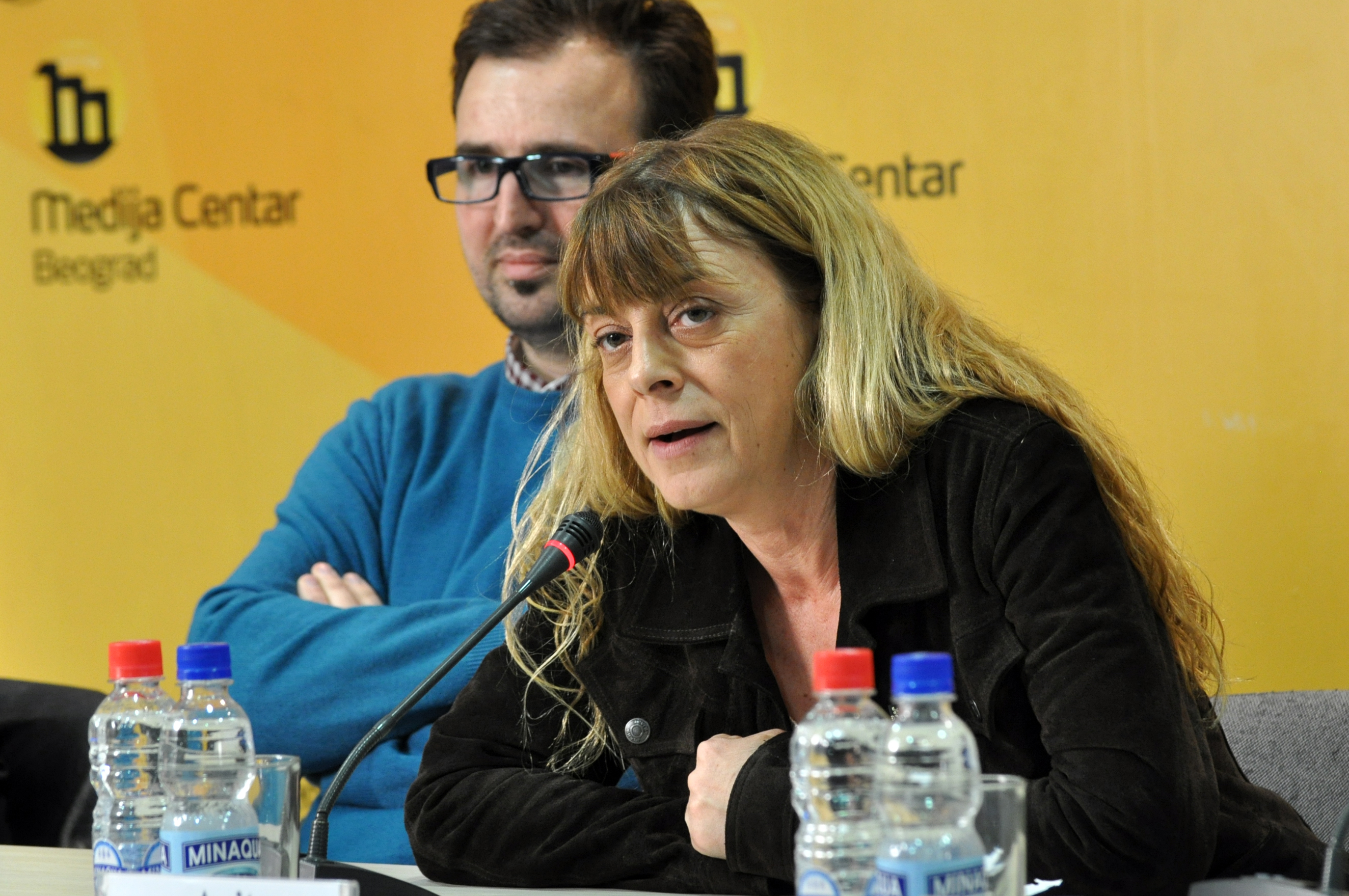 Anita Mančić, glumica